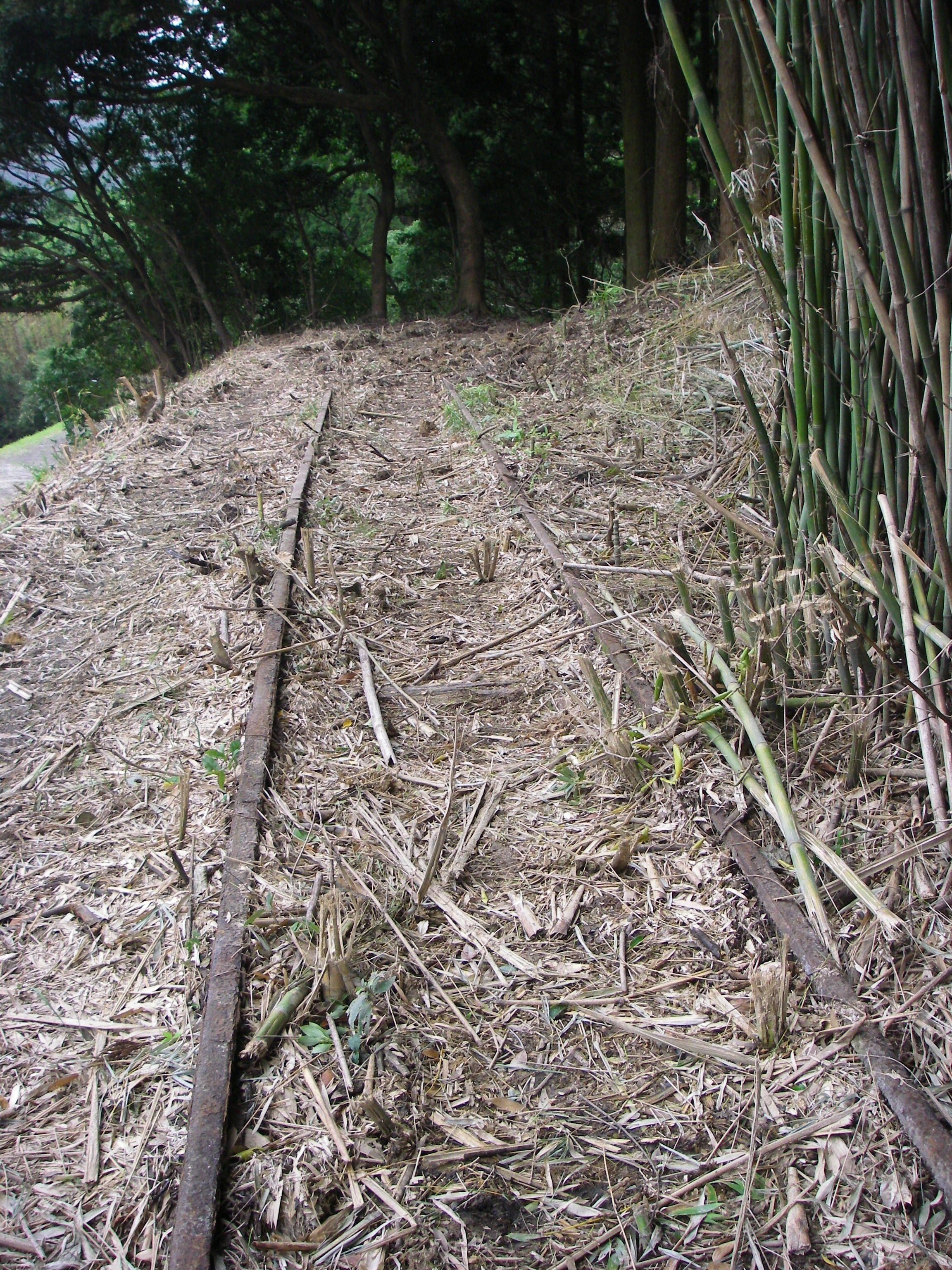 南薩鉄道上日置駅スイッチバック線路